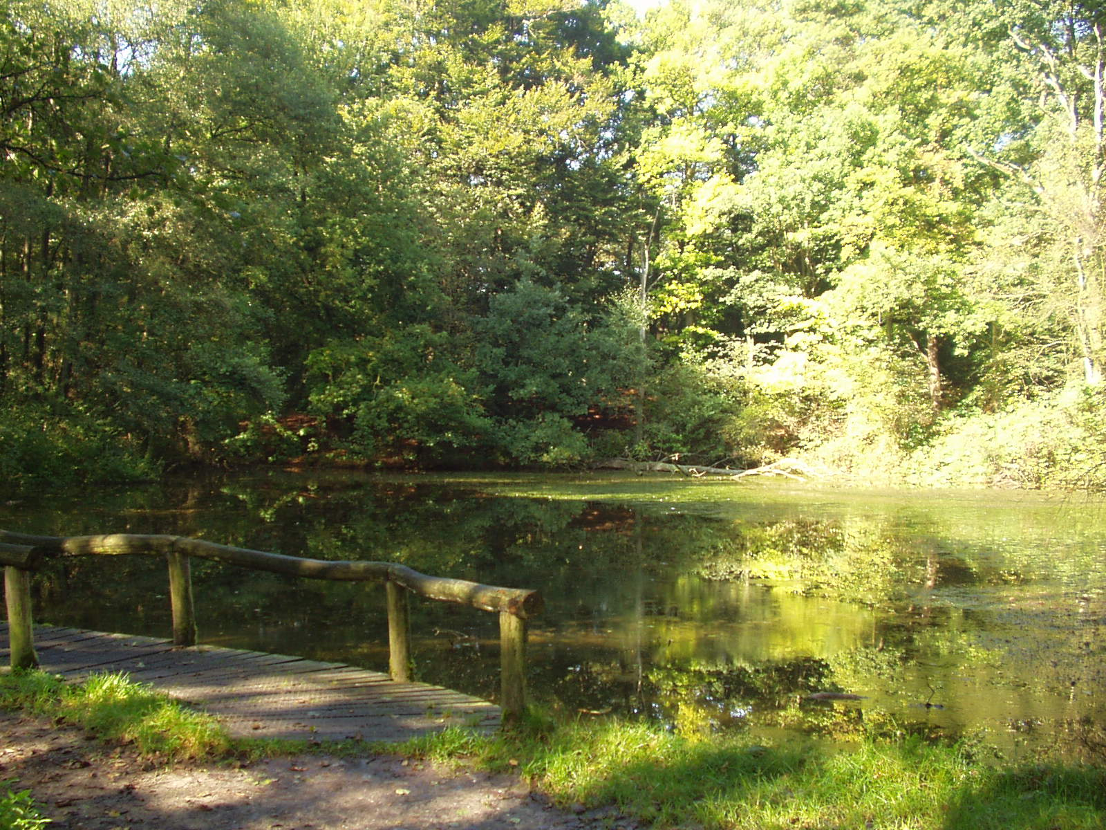 Het Springendal, Bronnenroute (Netherlands, Overijssel, Tubbergen)